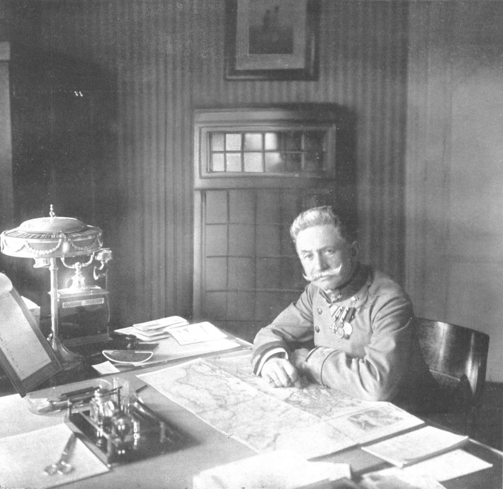 Geheimer Rat G. d. I. Franz Freiherr Conrad von Hötzendorf, Chef des Generalstabes der gesamten bewaffneten Macht Franz Conrad von Hötzendorf (1852-1925), Austrian general